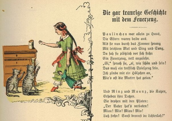 Der Struwwelpeter: Die gar traurige Geschichte mit dem Feuerzeug Tafel 1